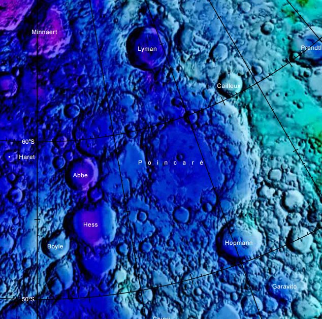 Cráter lunar Garavito. Localización. (Imagen LRO)